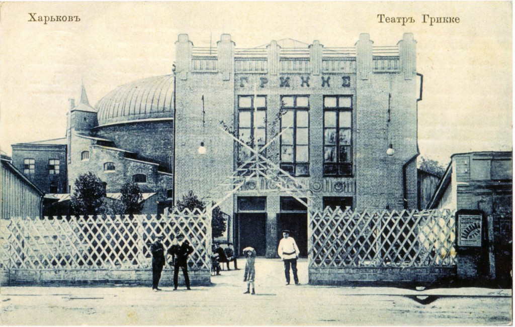 Цирк Генриха Грикке на бывшей Жандармской площади. 1906-1917гг. Харьков.